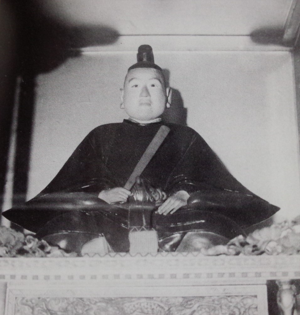 大岡忠光の木像。